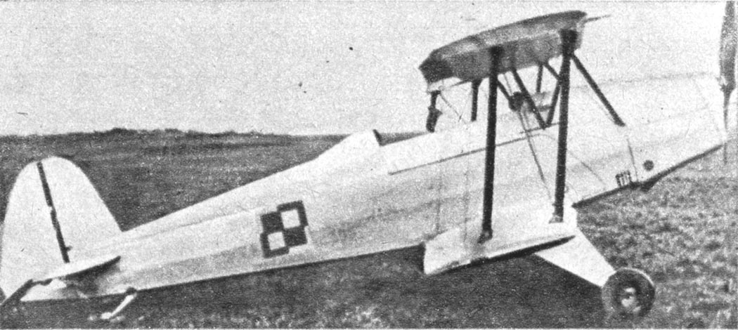 PWS-35 Ogar, cvičný, sportovní letoun